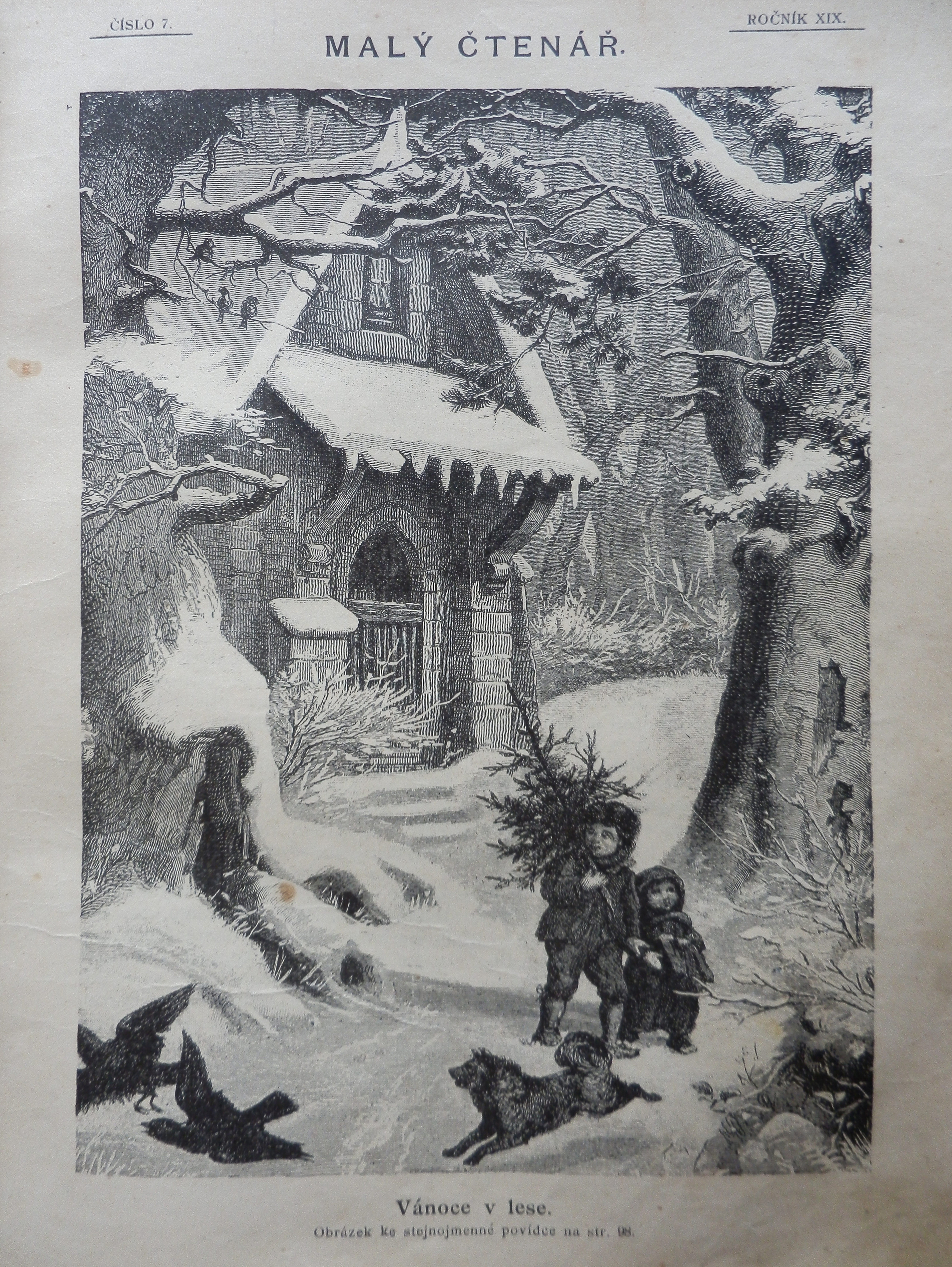 Malý čtenář 7/1899-1900, titulní stránka